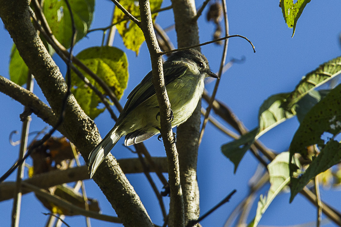 Pacific elaenia (Myiopagis subplacens) - South Ecuador_S4E9334